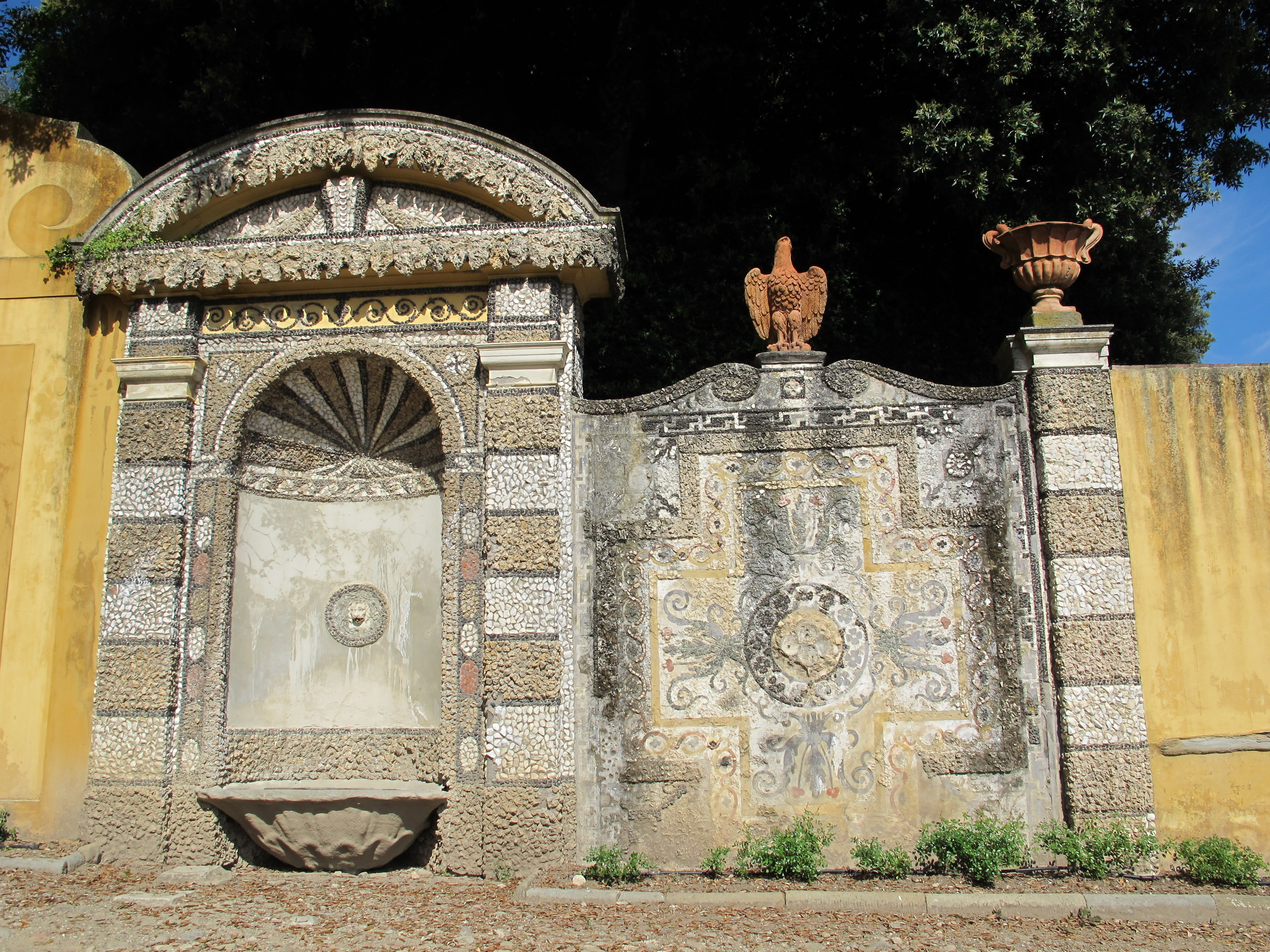 Villa medici di belcanto, ingresso